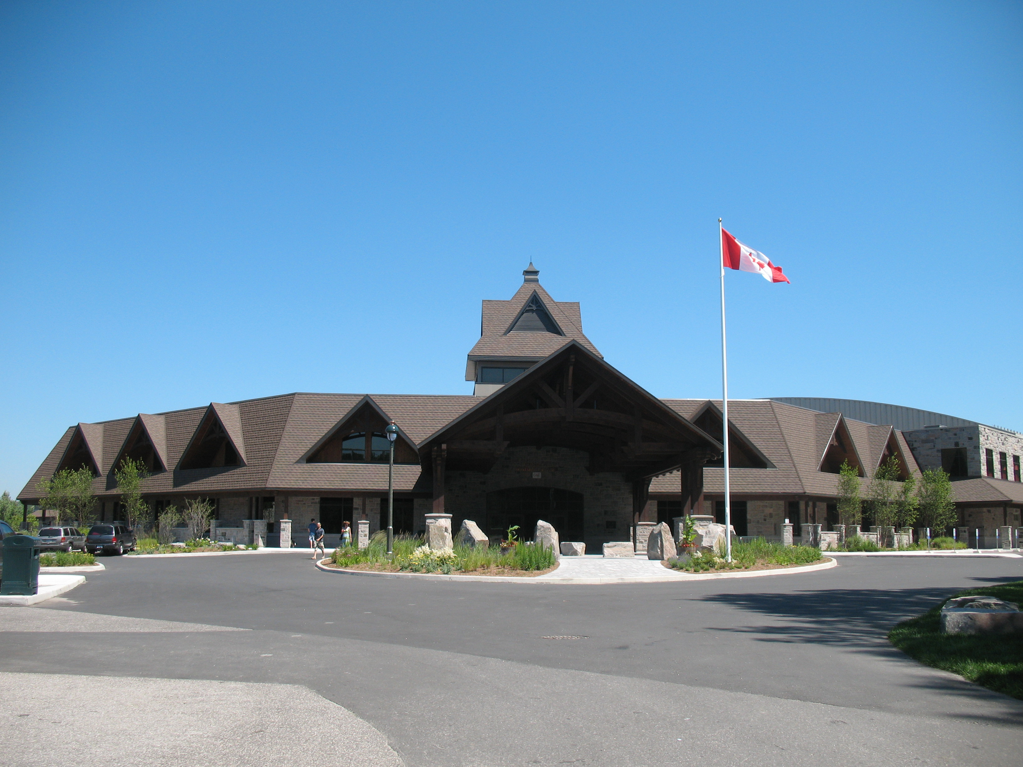 Centennial_Park in Huntsville im kanadischen Ontario